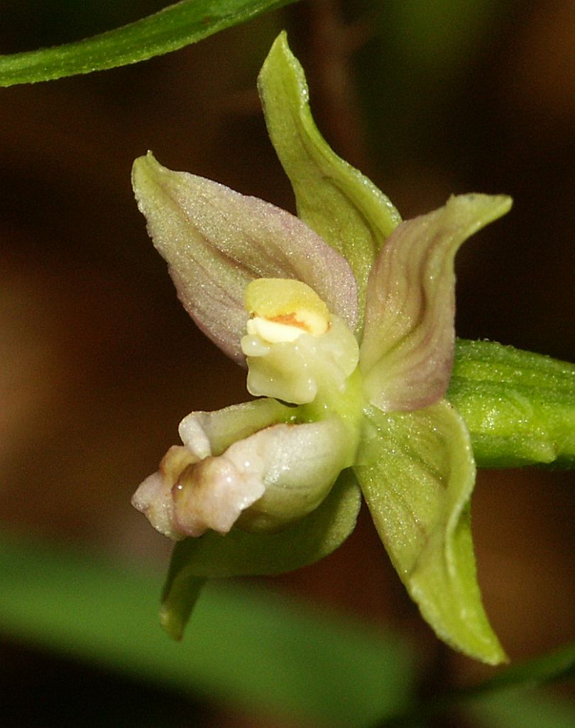 Epipactis helleborine, Schwäbisch-Fränkischer Wald, Germany